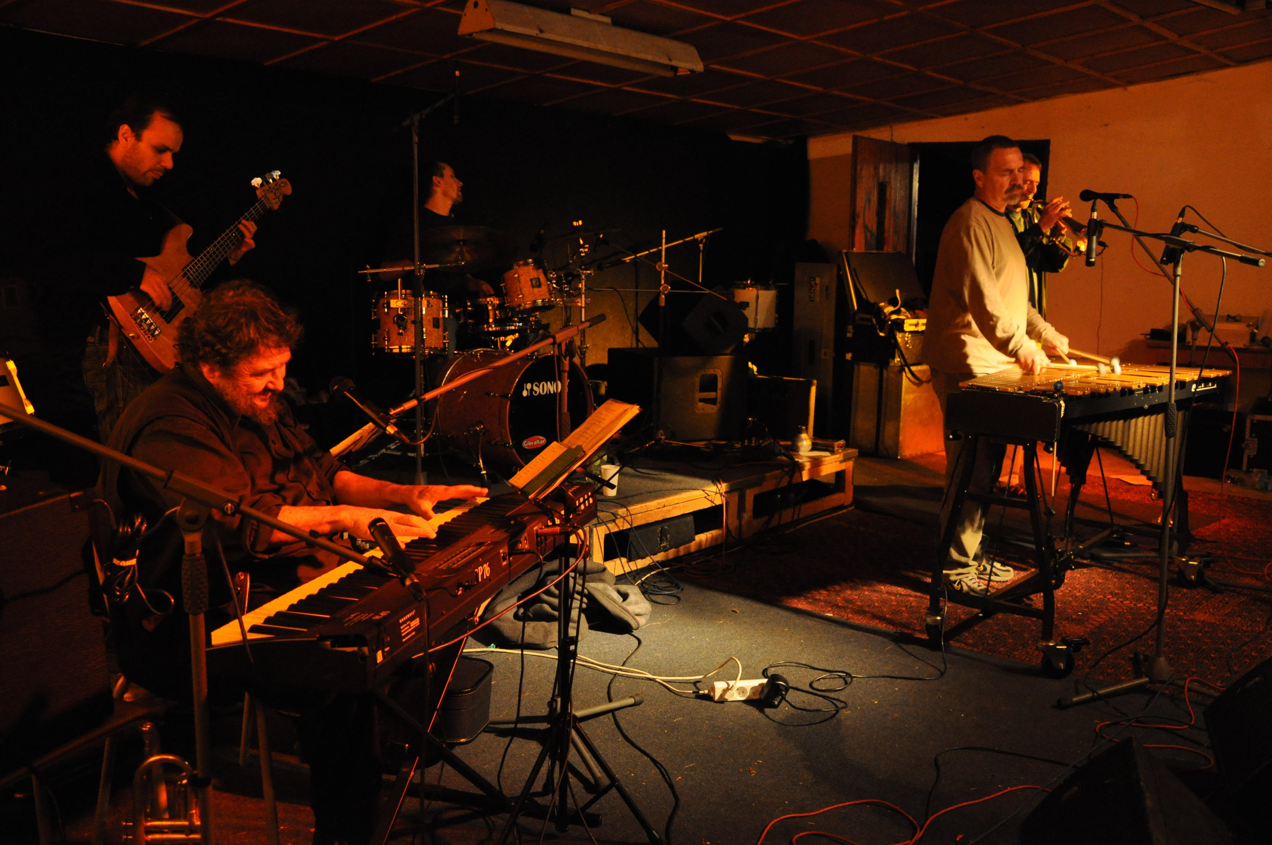 Jan Spálený a ASPM na festivalu Otevřeno Jimramov 2009